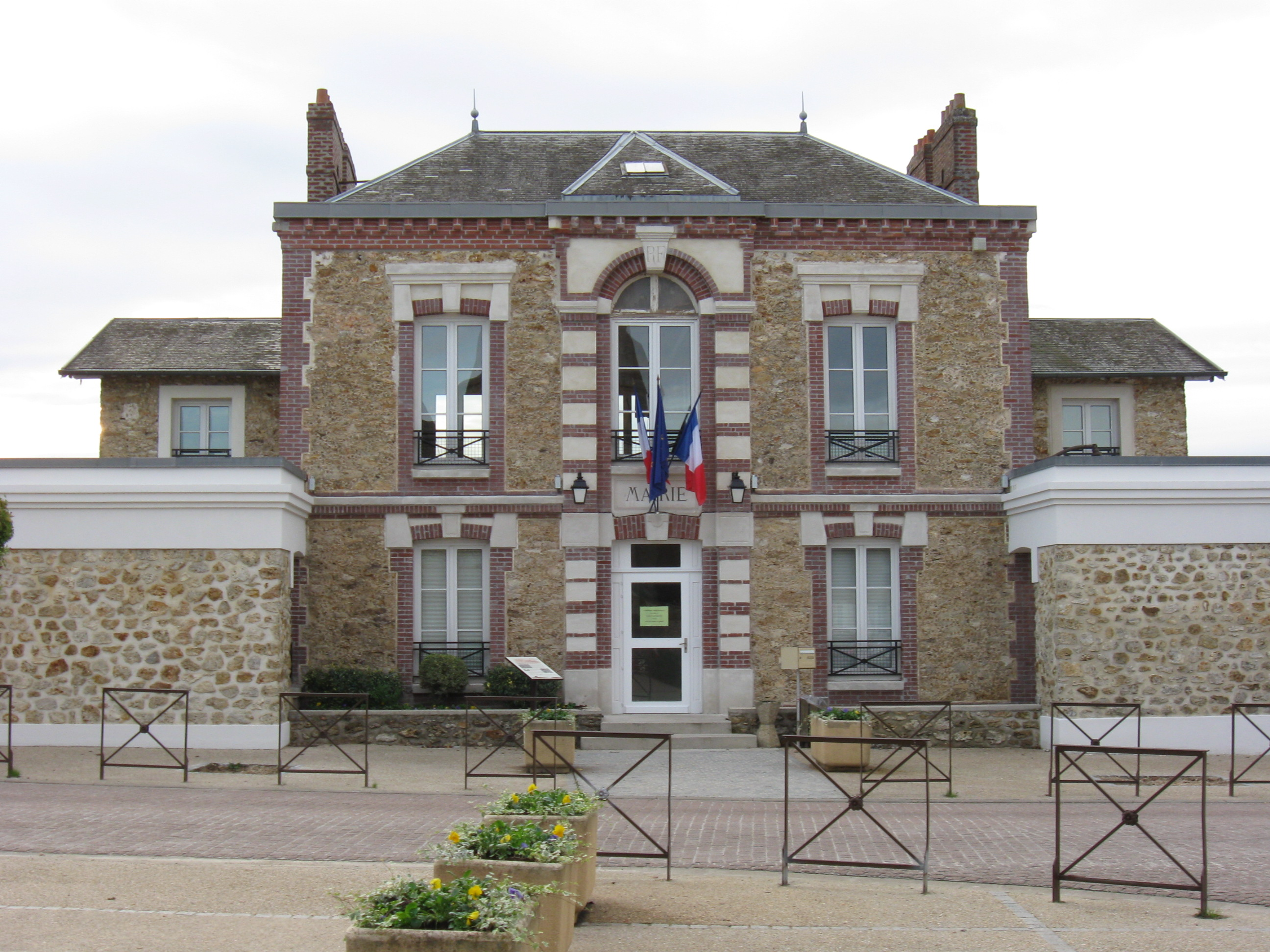 Mairie de Pommeuse (département de la Seine et Marne, région Île-de-France).